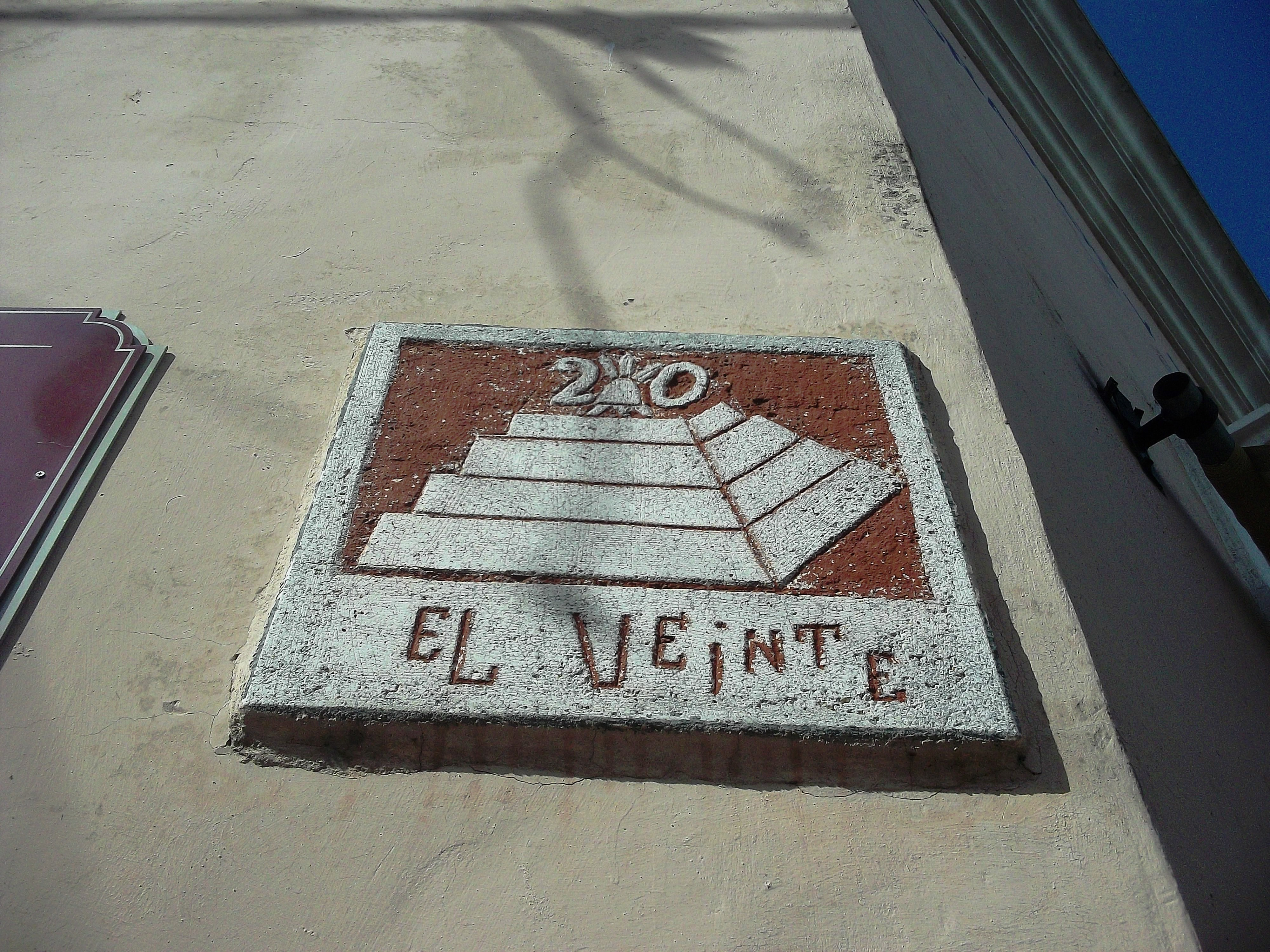 Esquina de El Veinte en Mérida, Yucatán.